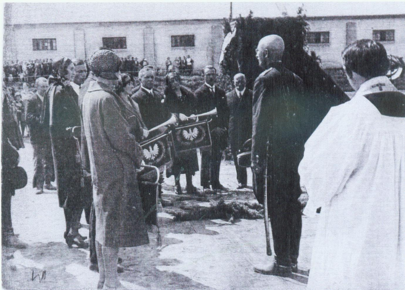 Oficjalna uroczystość